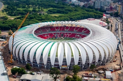 Estádio Beira-Rio, Porto Alegre, Brasil. Versão cortada e editada, dando mais destaque ao estádio.